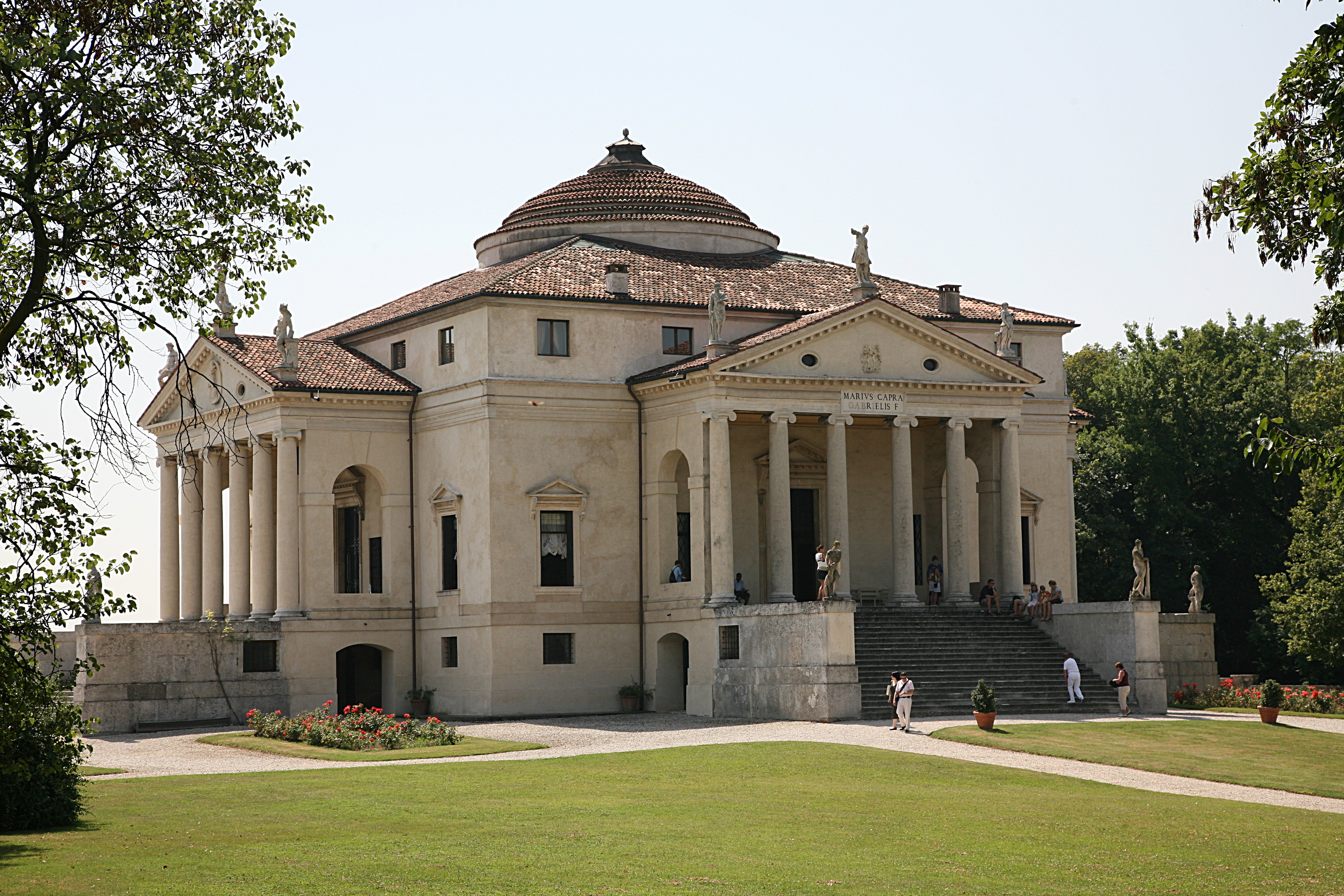 La Rotunda by Andrea Palladio